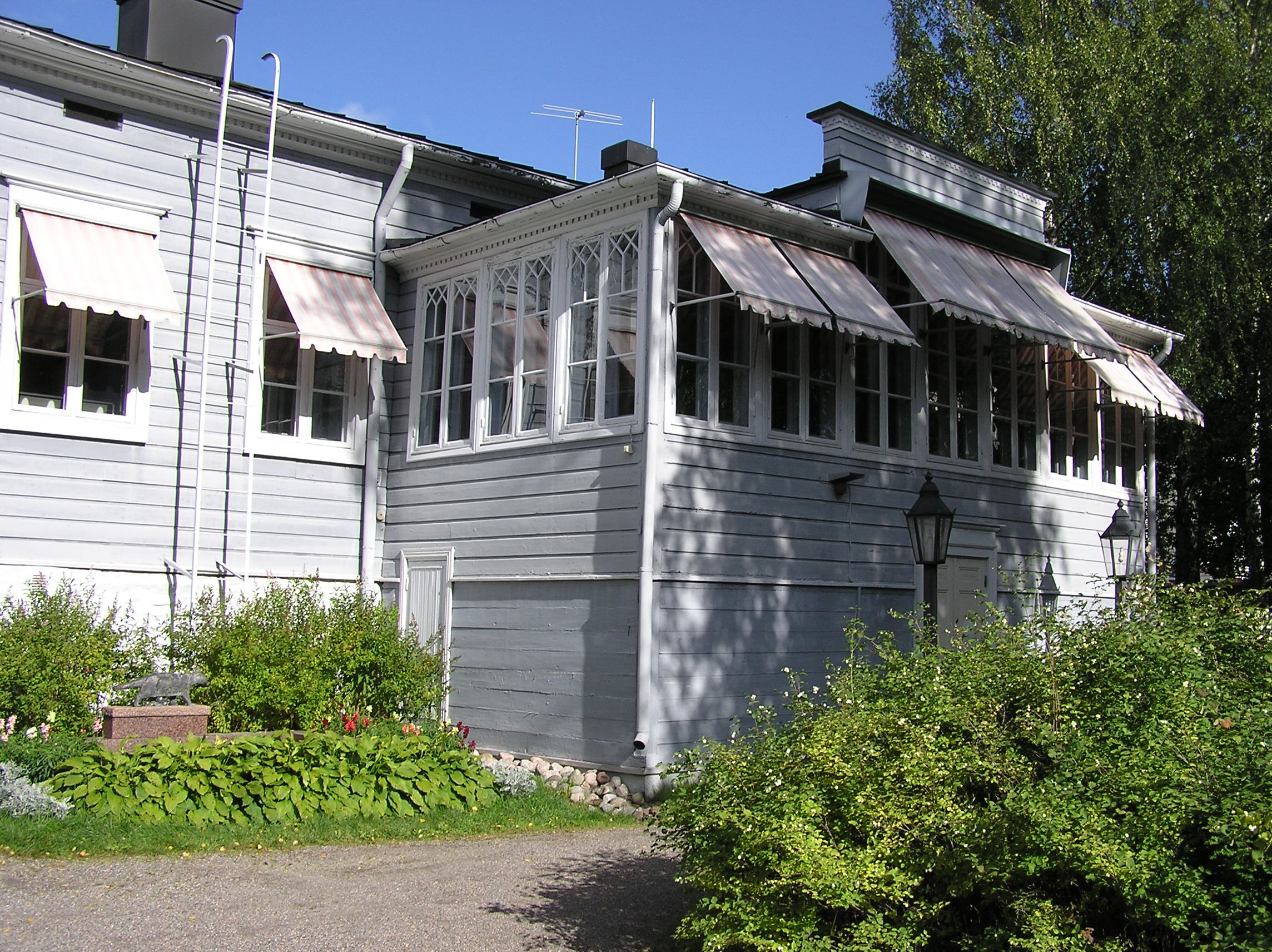 Kauppakatu 14, Heinola